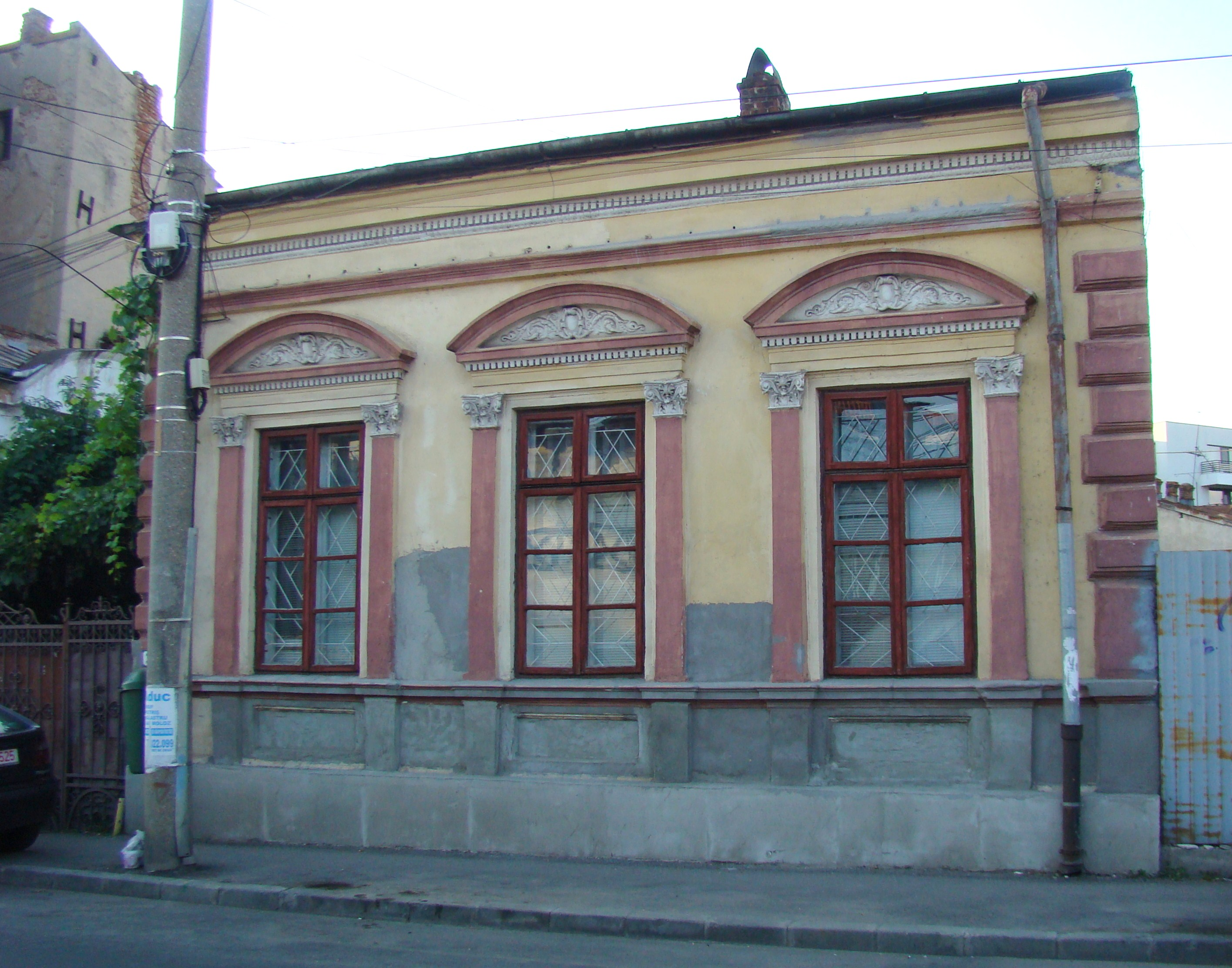 Clădire monument istoric, str. Mircea Vulcănescu, nr.38